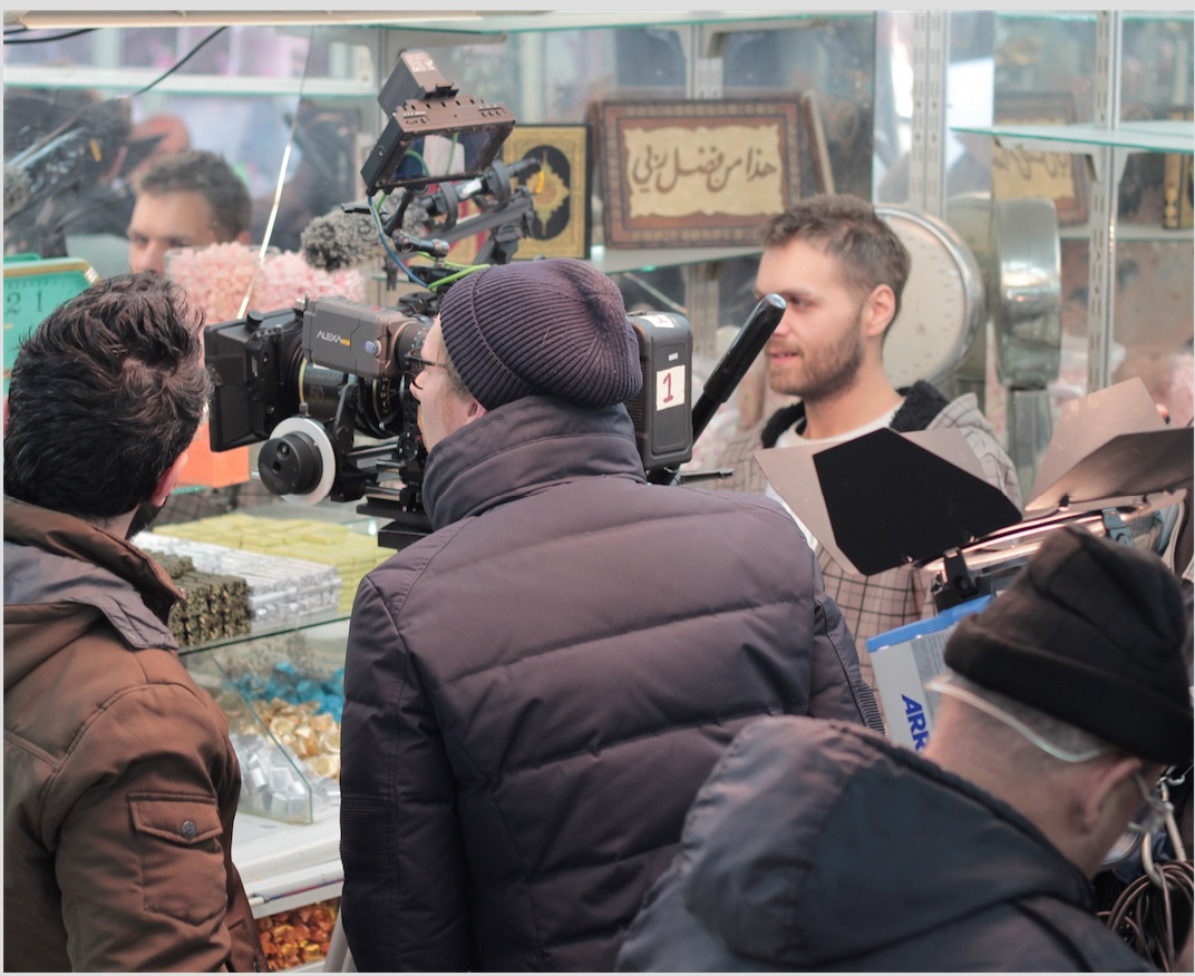 Benjamin Loyauté and is crew filming, Lebanon, 2016.